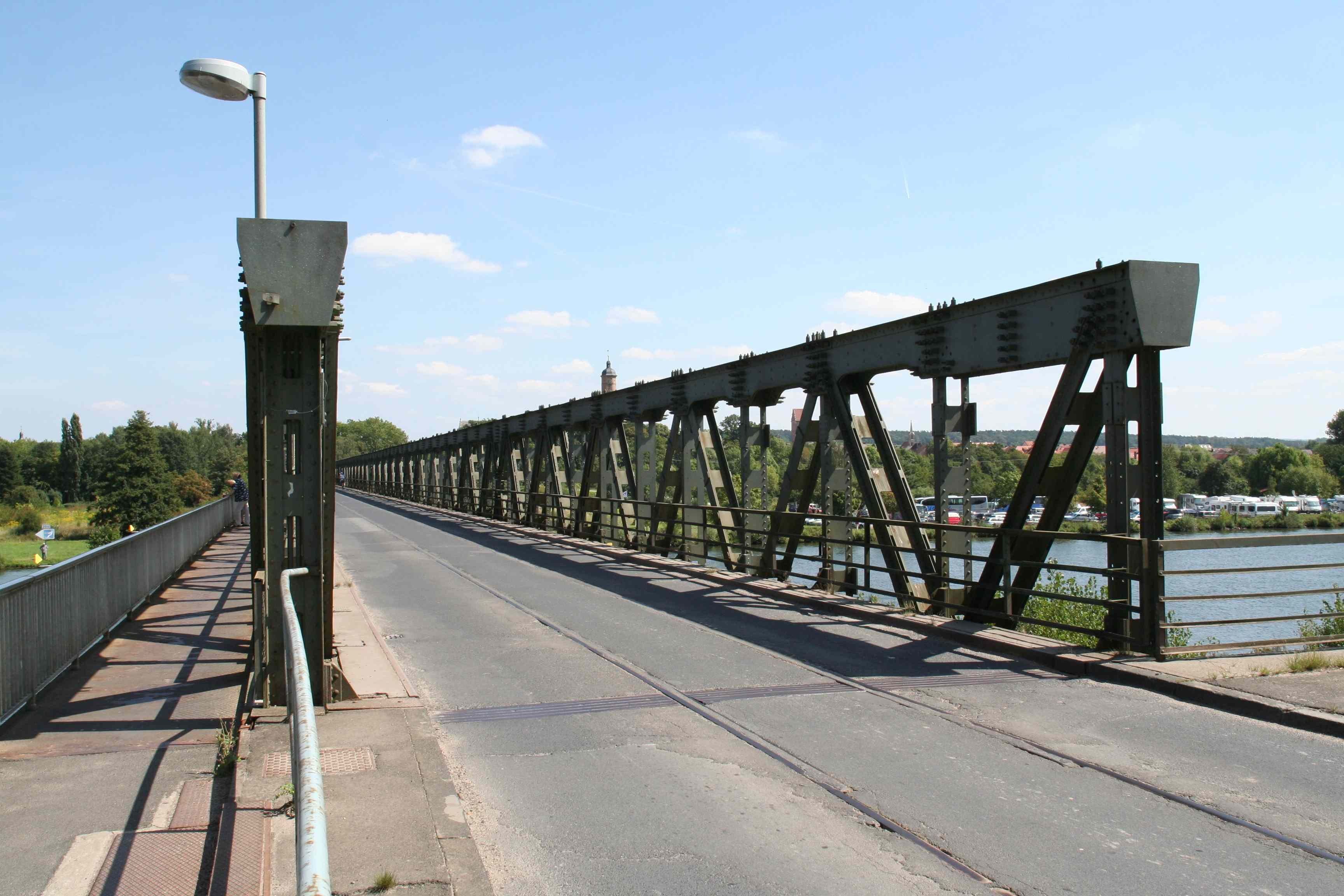 Mainbrücke Volkach, Landkreis Kitzingen, Unterfranken